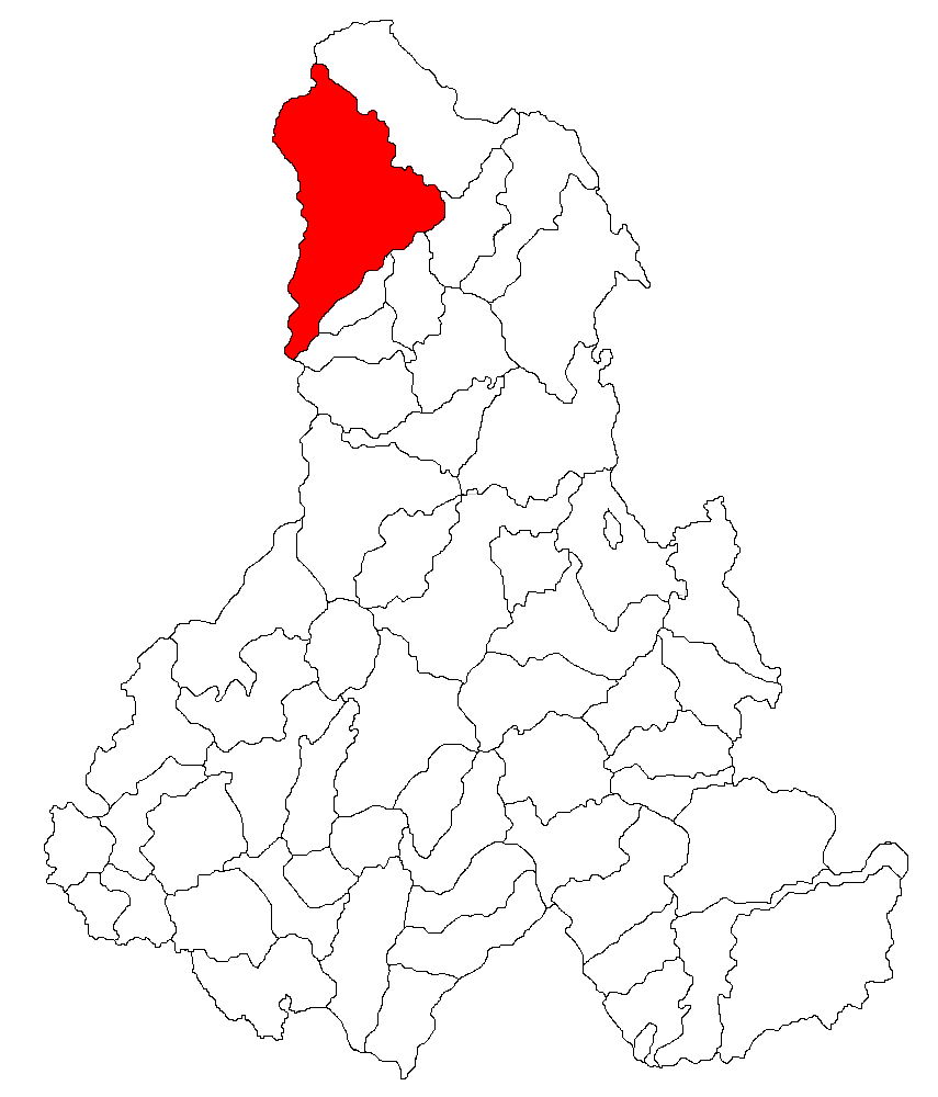 Categorie:Hărţi ale judeţului Harghita